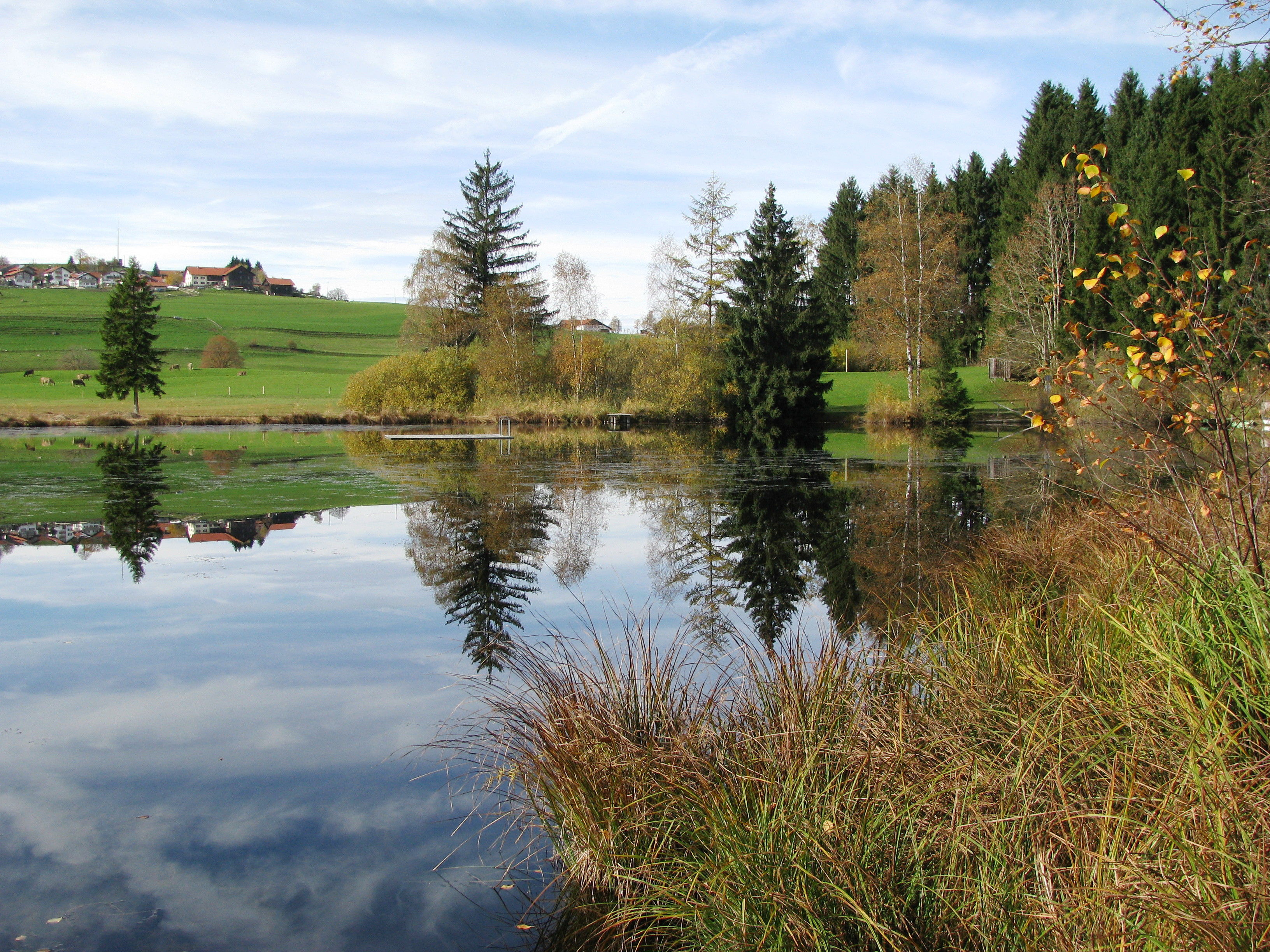 Notzenweiher; Nordteil nach Westen; im Hintergrund Hauptmannsgreut